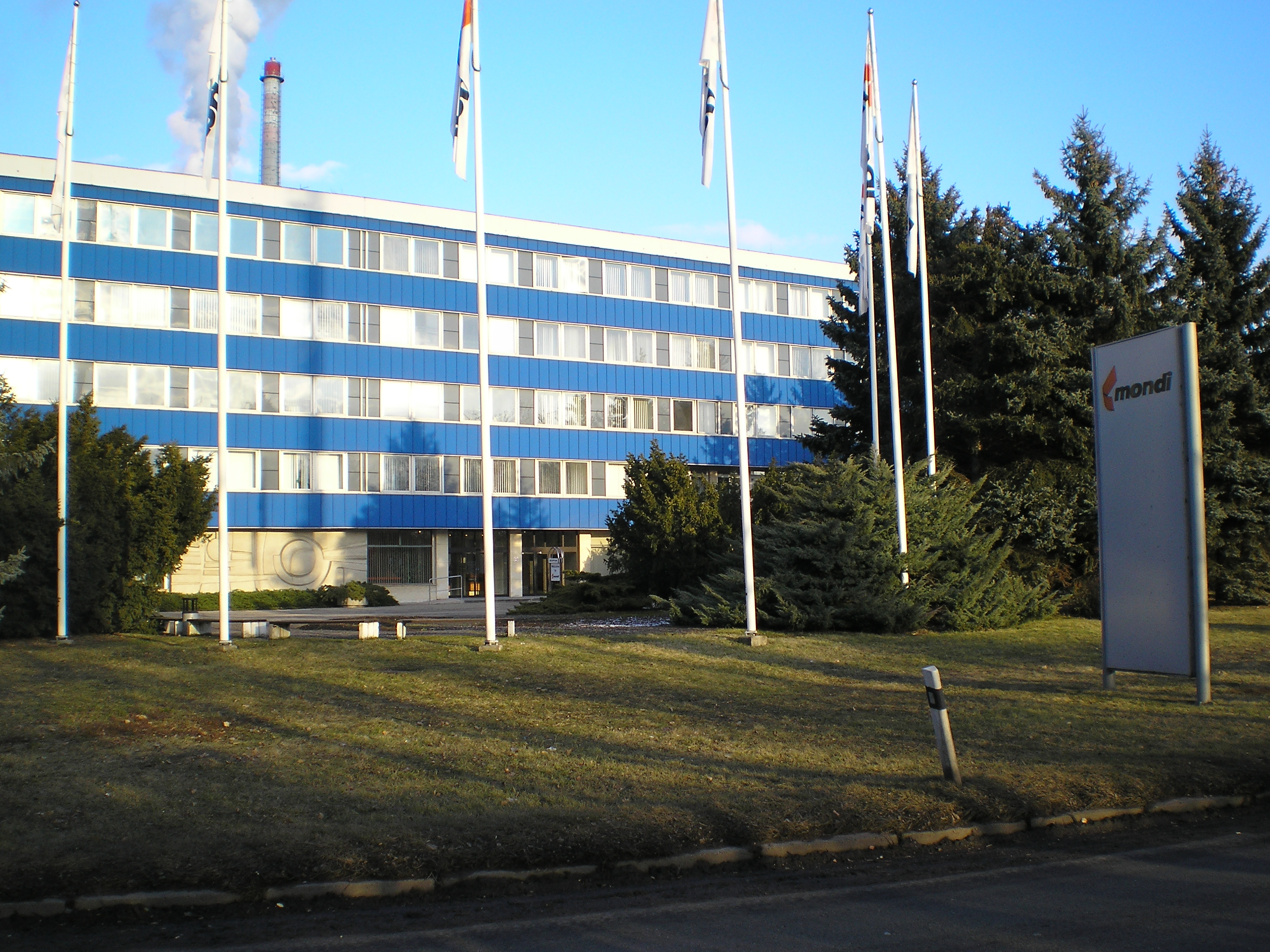 Hlavní budova s recepcí do papírenského komplexu